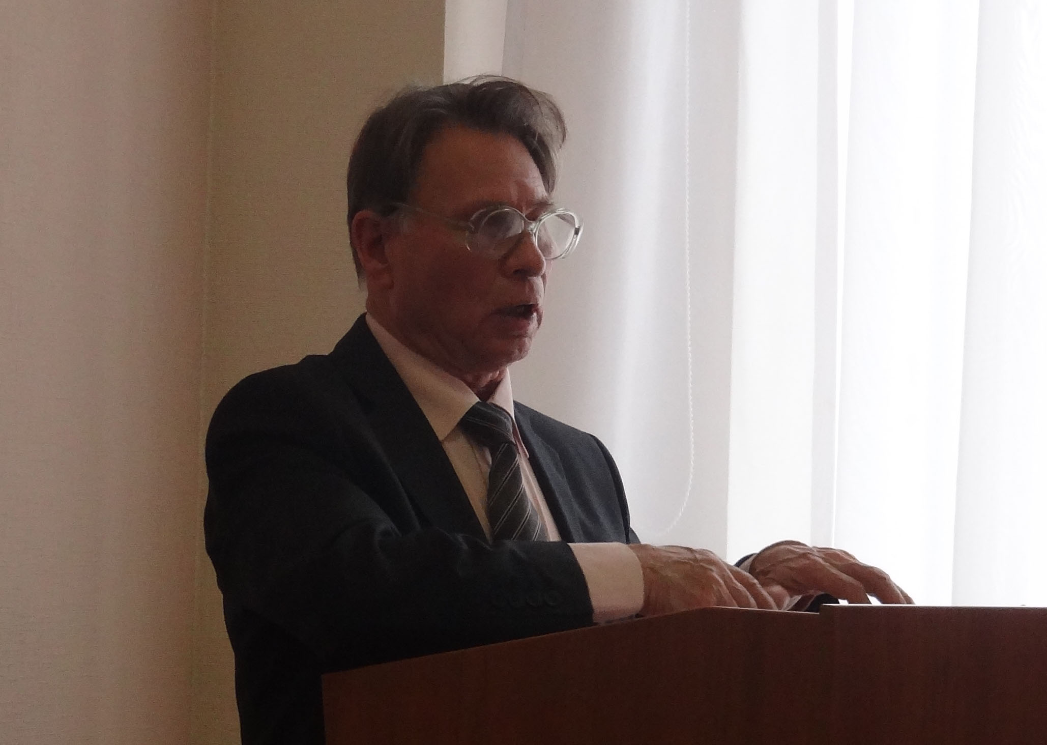 Выступление на 18-м съезде Союза писателей Удмуртии. Ванюшев, Василий Михайлович — советский и российский удмуртский поэт и филолог. Член Союза писателей России, заслуженный деятель науки Удмуртской Республики. Доктор филологических наук. Выпустил более 20 книг.